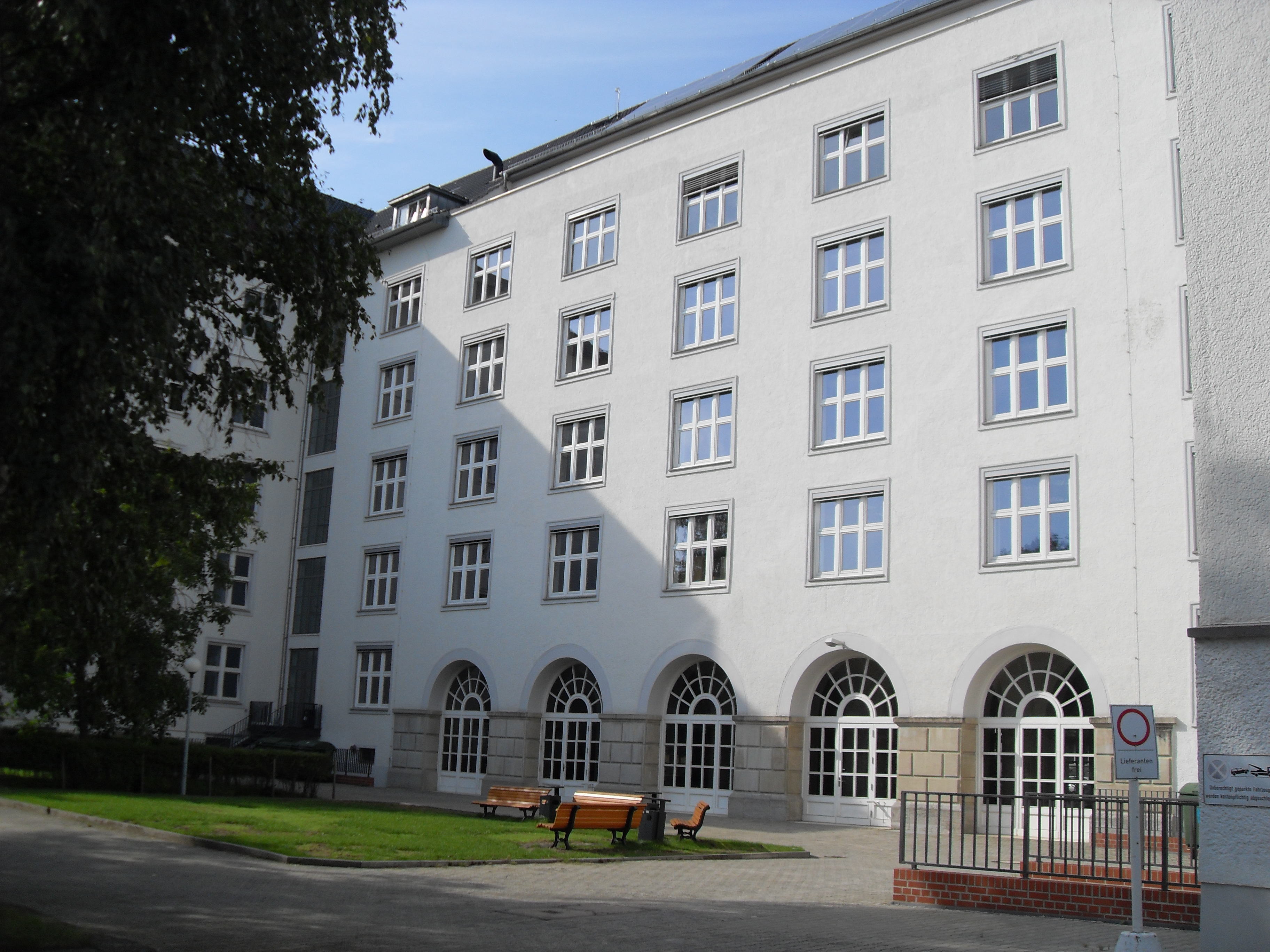 Campus Schöneberg Haus B Hofseite